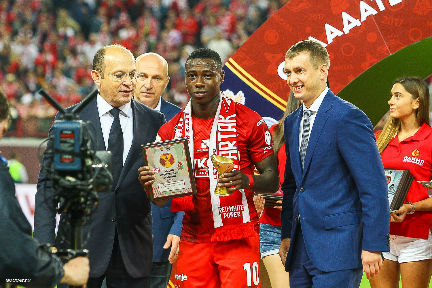 Квинси Промес - лучший игрок матча за Суперкубок России-2017